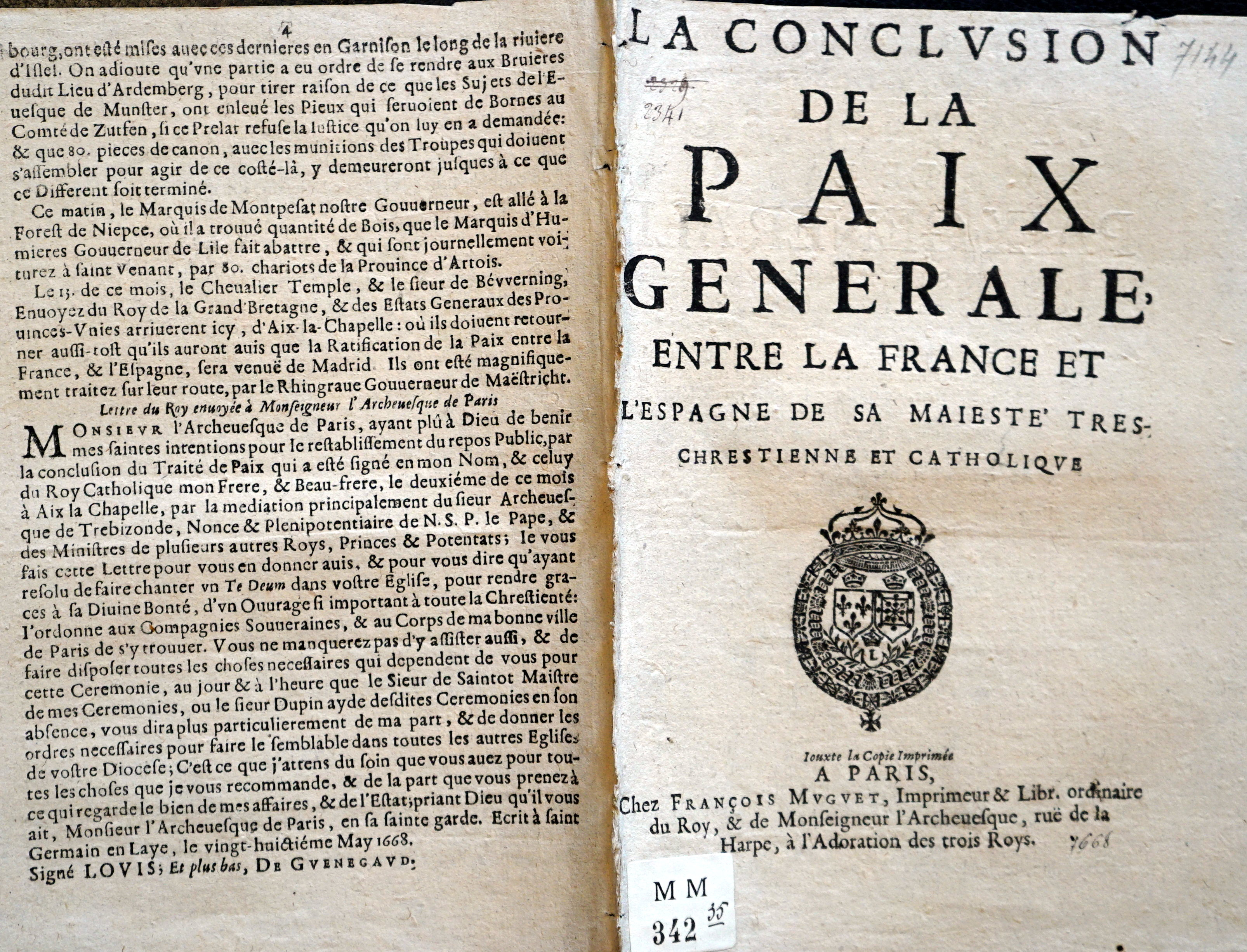 tiré d'un imprimé du XVIIe siècle conservé à Reims.